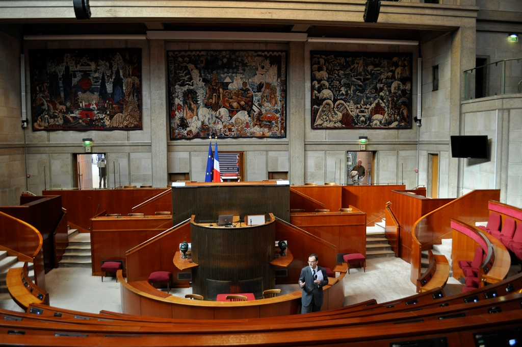 Hémicycle du Palais d'Iéna, 9 Place d'Iéna, 16e arrondissement de Paris, Photo prise lors des journées européennes du patrimoine 2012.